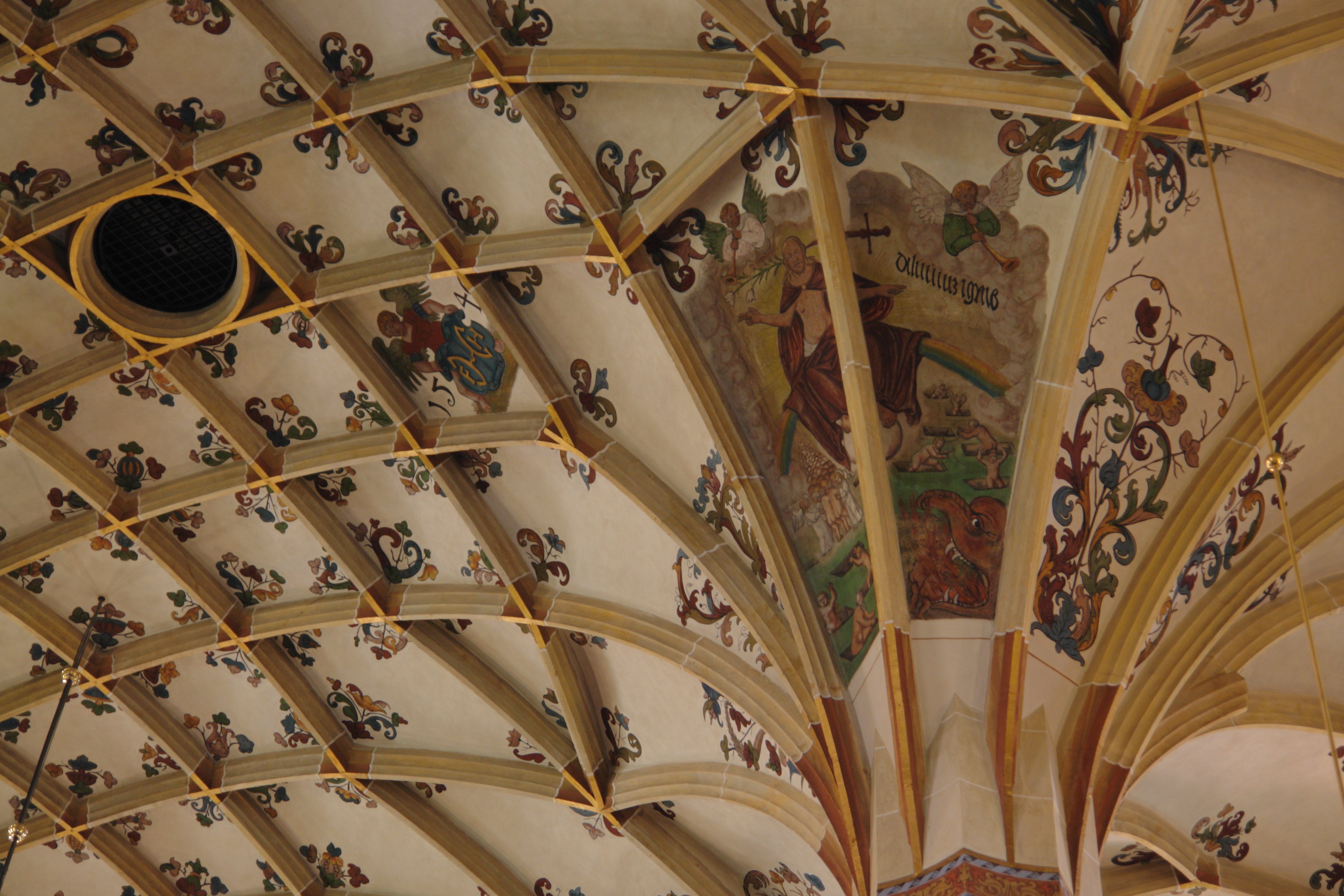 Säule